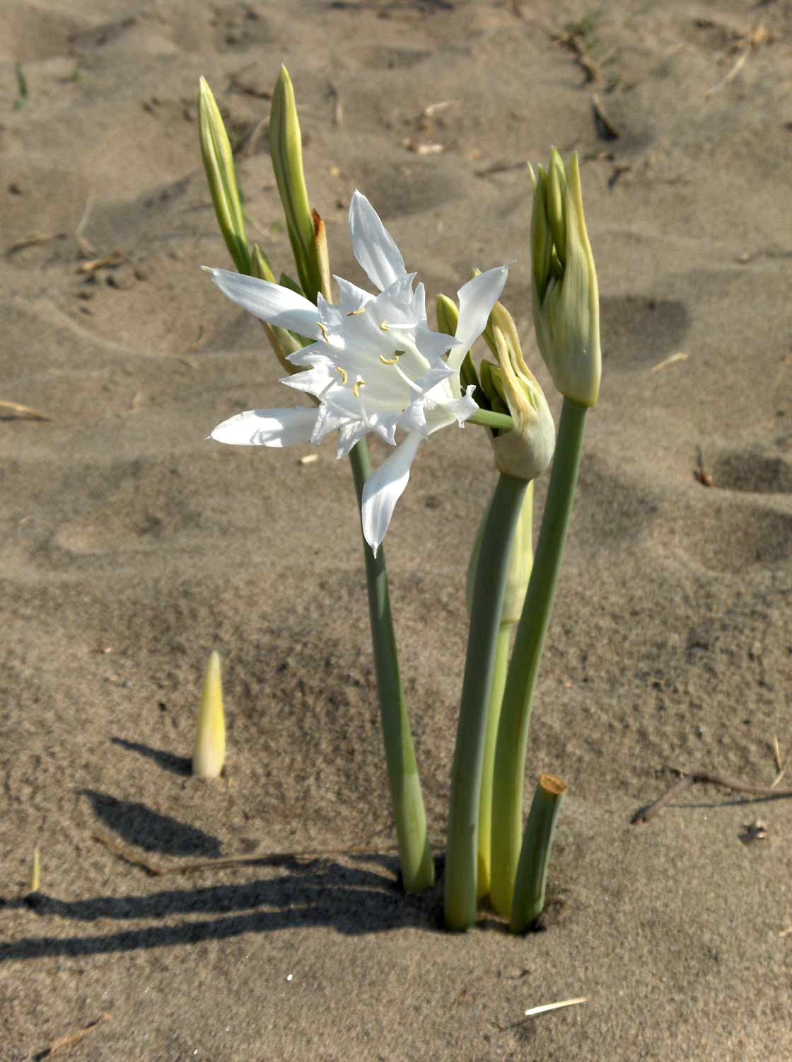 Pancratium maritimum, Paestum, Campania, Italy